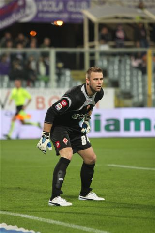 Artur Boruc è un calciatore polacco che gioca come portiere nella Fiorentina e della Nazionale polacca.